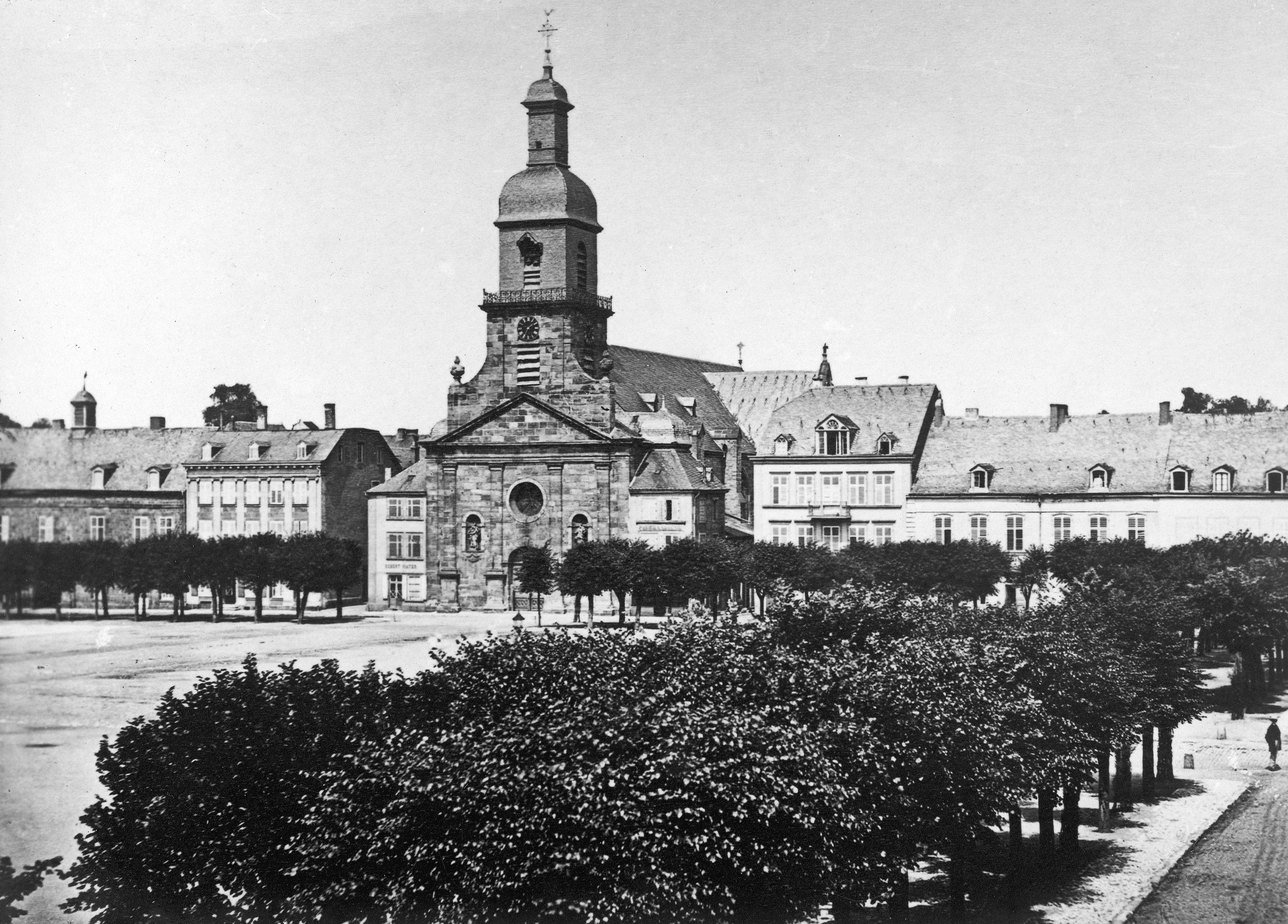 St. Ludwig (Saarlouis), Turmfront der ursprünglichen Barockkirche vor dem Brand des Jahres 1880, (Archiv des Institutes für aktuelle Kunst im Saarland)